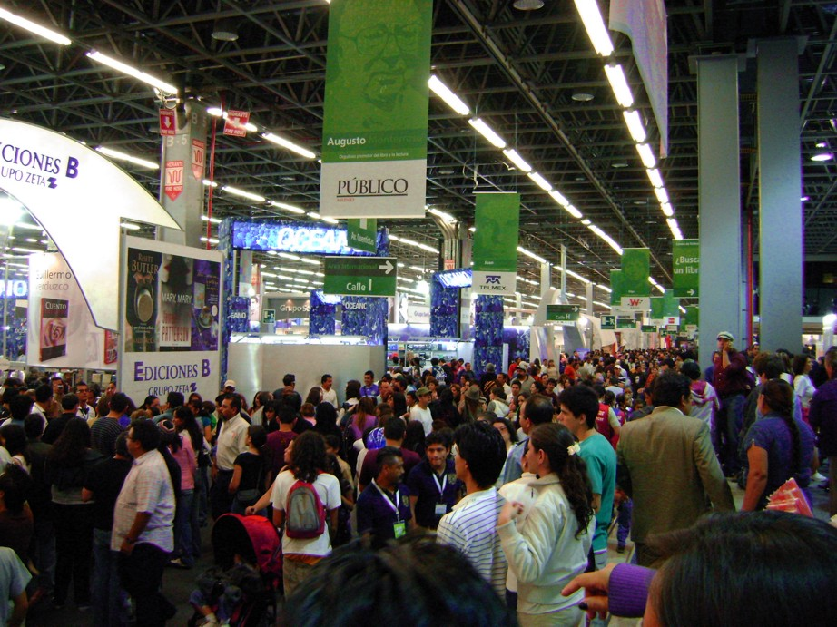 Interior FIL 2008